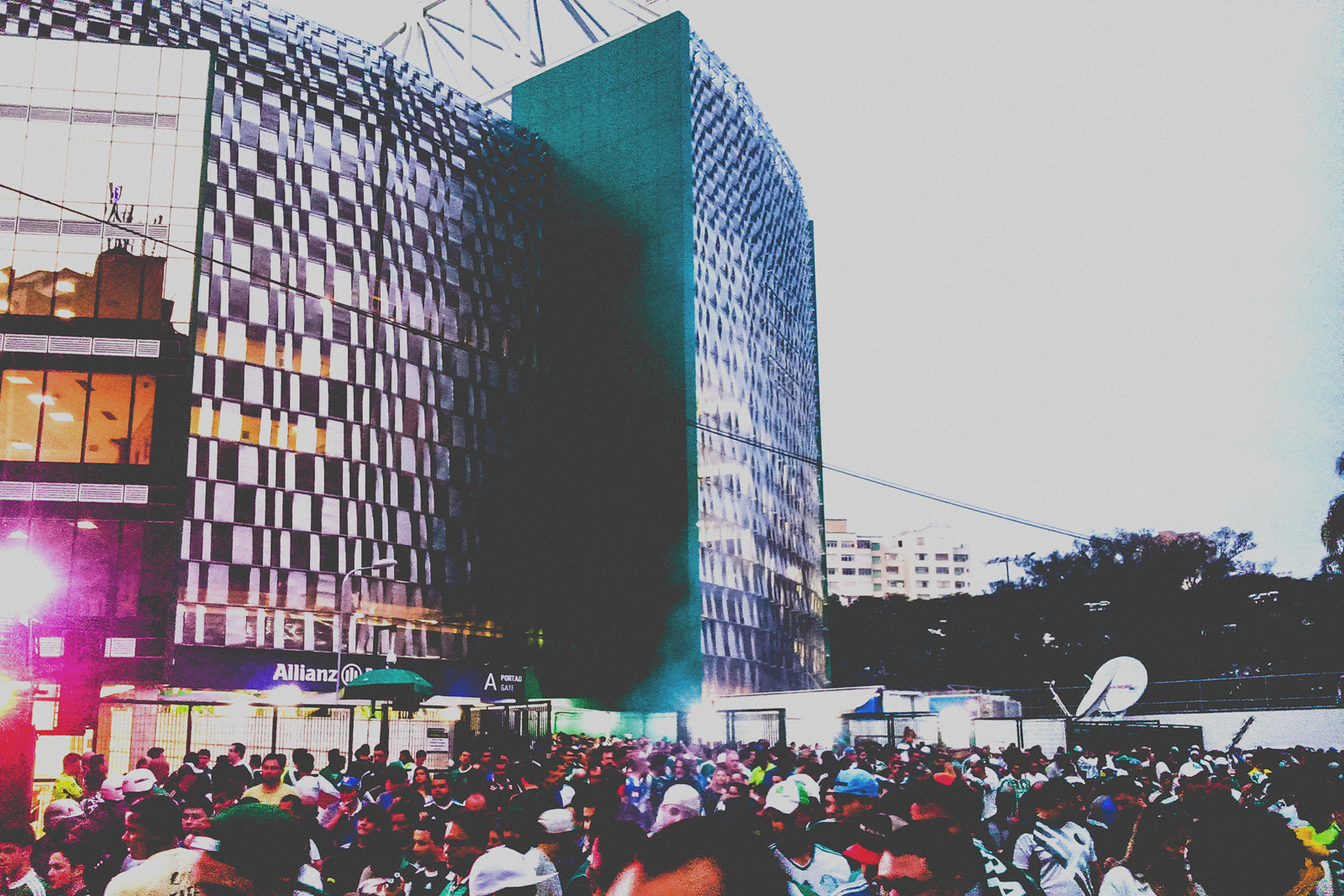 Allianz Parque, São Paulo, SP, Brasil. 06 de setembro de 2015. Facebook || Instagram || Tumblr || Twitter || VSCO Grid